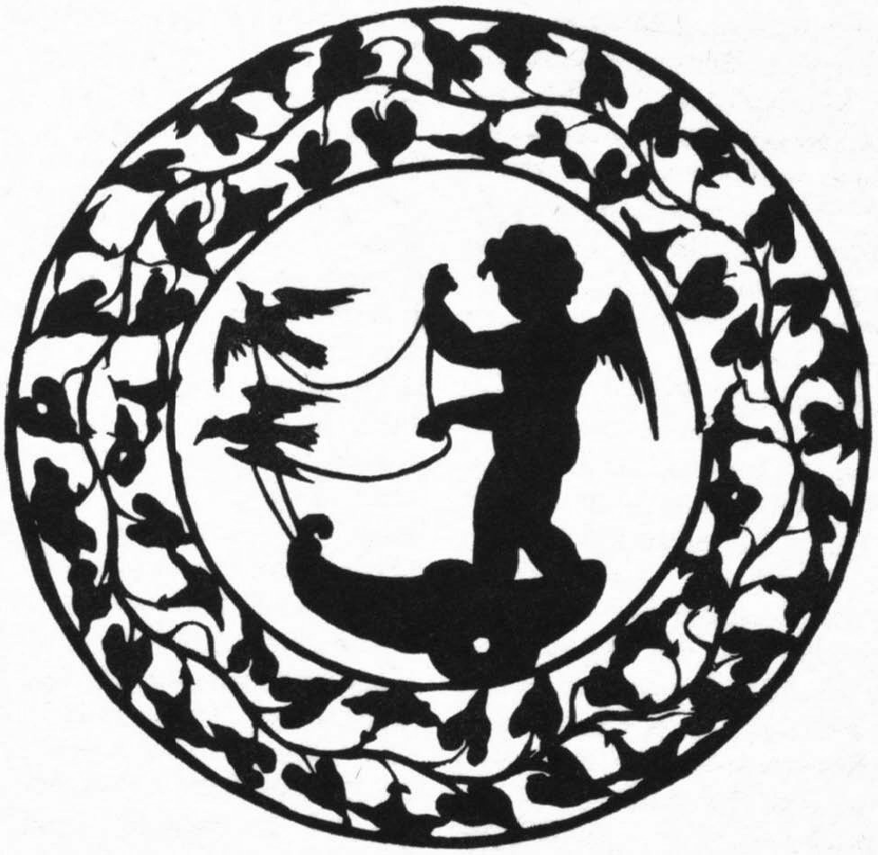 Luise Duttenhofer: Amor auf dem Muschelwagen, schwarzer Scherenschnitt, Rundmedaillon, Abmessungen unbekannt, Entstehungsjahr unbekannt, Stuttgart, Landesmuseum Württemberg. Der geflügelte, nackte Amor steht auf einem zweirädrigen Muschelwagen. Mit dem Zügel lenkt Amor zwei Turteltauben gezogen, Symbolvögel der Liebe, die den Wagen ziehen. Das Bildnismedaillon wird von einer Arabeske eingerahmt, die aus einer wellenförmigen Ranke mit Blättern und Blüten besteht. Duttenhofer, Luise, Amor auf dem Muschelwagen, Zeichnung.jpg ist wahrscheinlich eine Entwurfszeichnung für diesen Scherenschnitt.